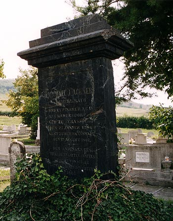 Johann Michael Ackner-Gedenkstein in Hammersdorf (Guşteriţa) bei Hermannstadt (Sibiu), Siebenbürgen Möglichkeiten zur Lizenzierung